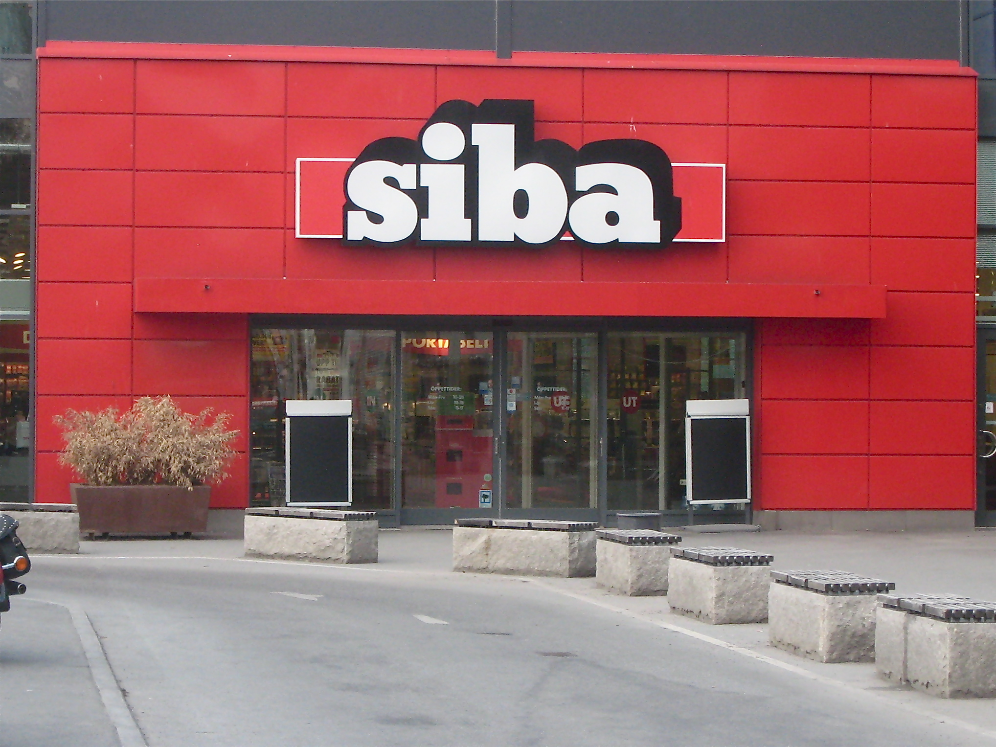 Siba shop in Sickla.